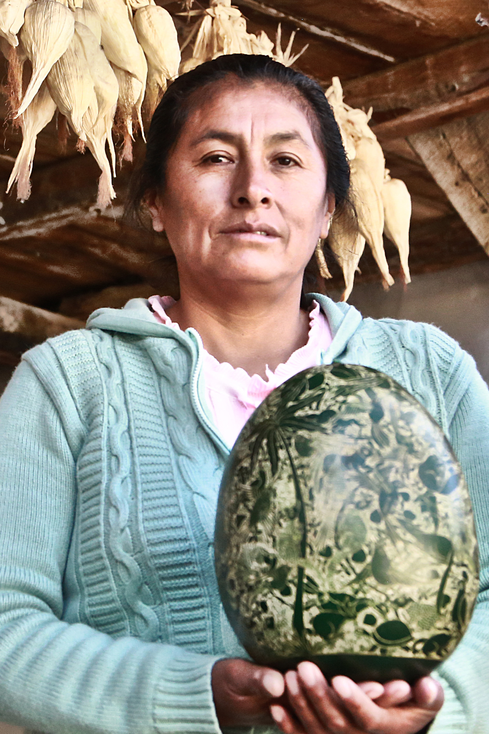 Retrato de la artista y ecologista Irma Luz Poma Canchumani sosteniendo una de sus obras, un mate burilado de gran delicadeza artística, en su casa-taller en Cochas Grande, distrito El Tambo, Junín - Perú.